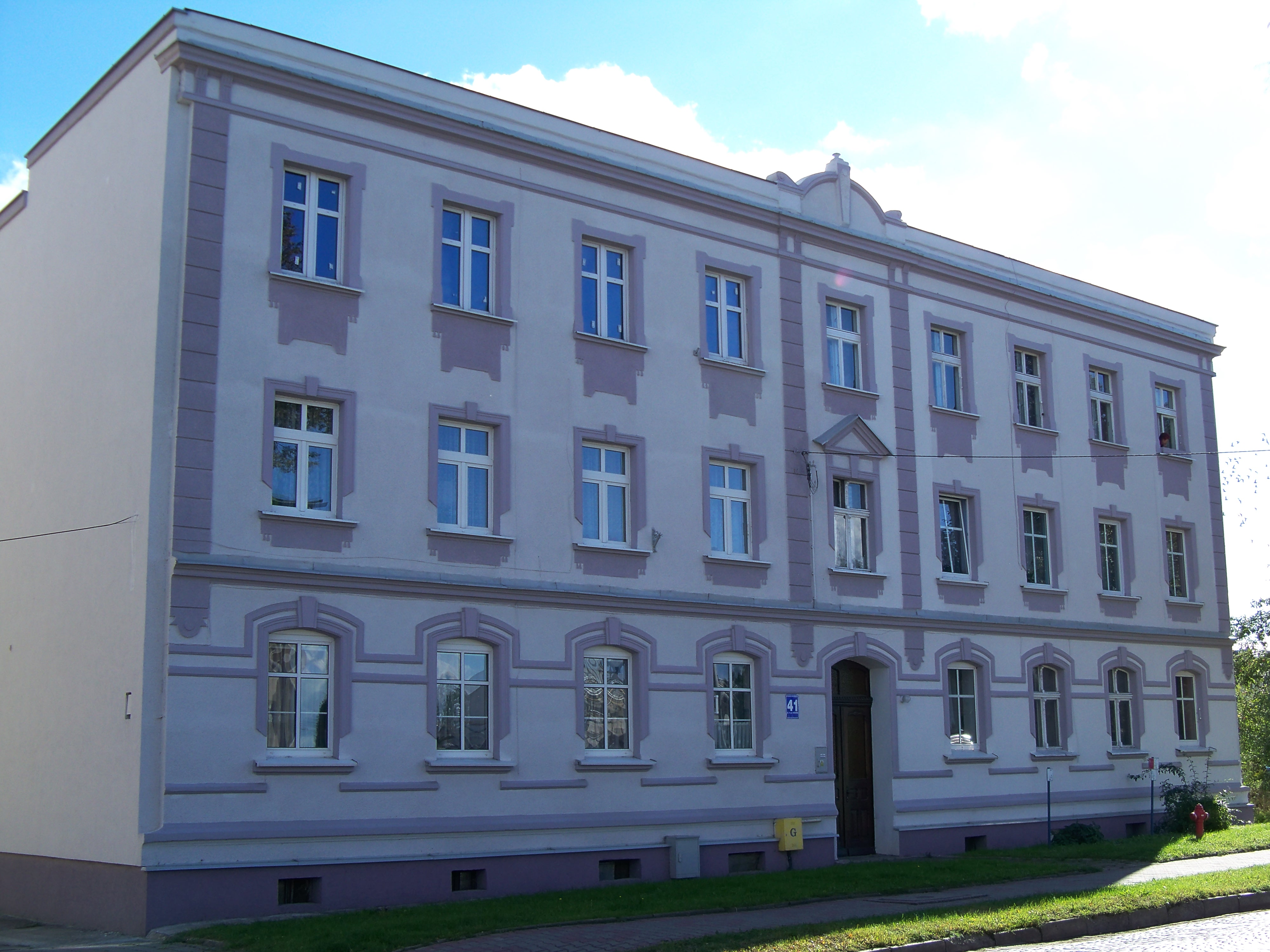 dom Ostróda, ul. 11 Listopada 41, Ostróda (gmina miejska)